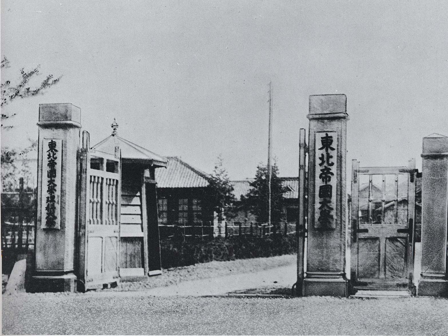 東北帝国大学正門